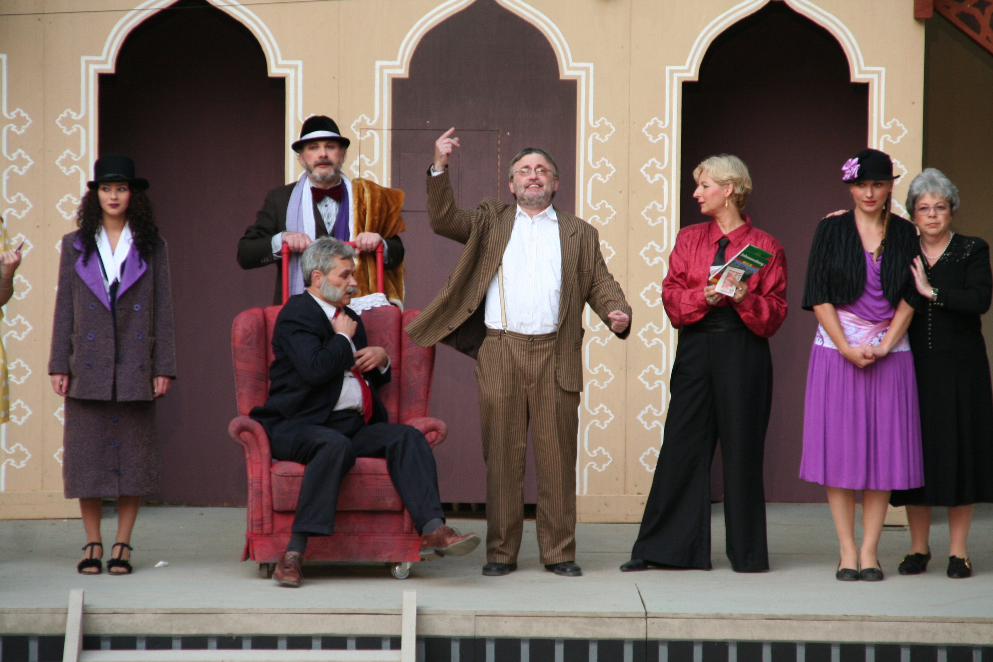 Bemalung des Technikhauses beim Naturtheater Renningen